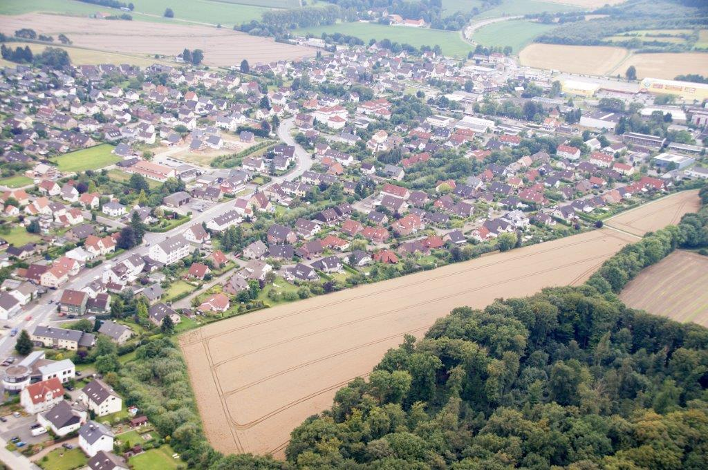 Luftbild von Asemissen